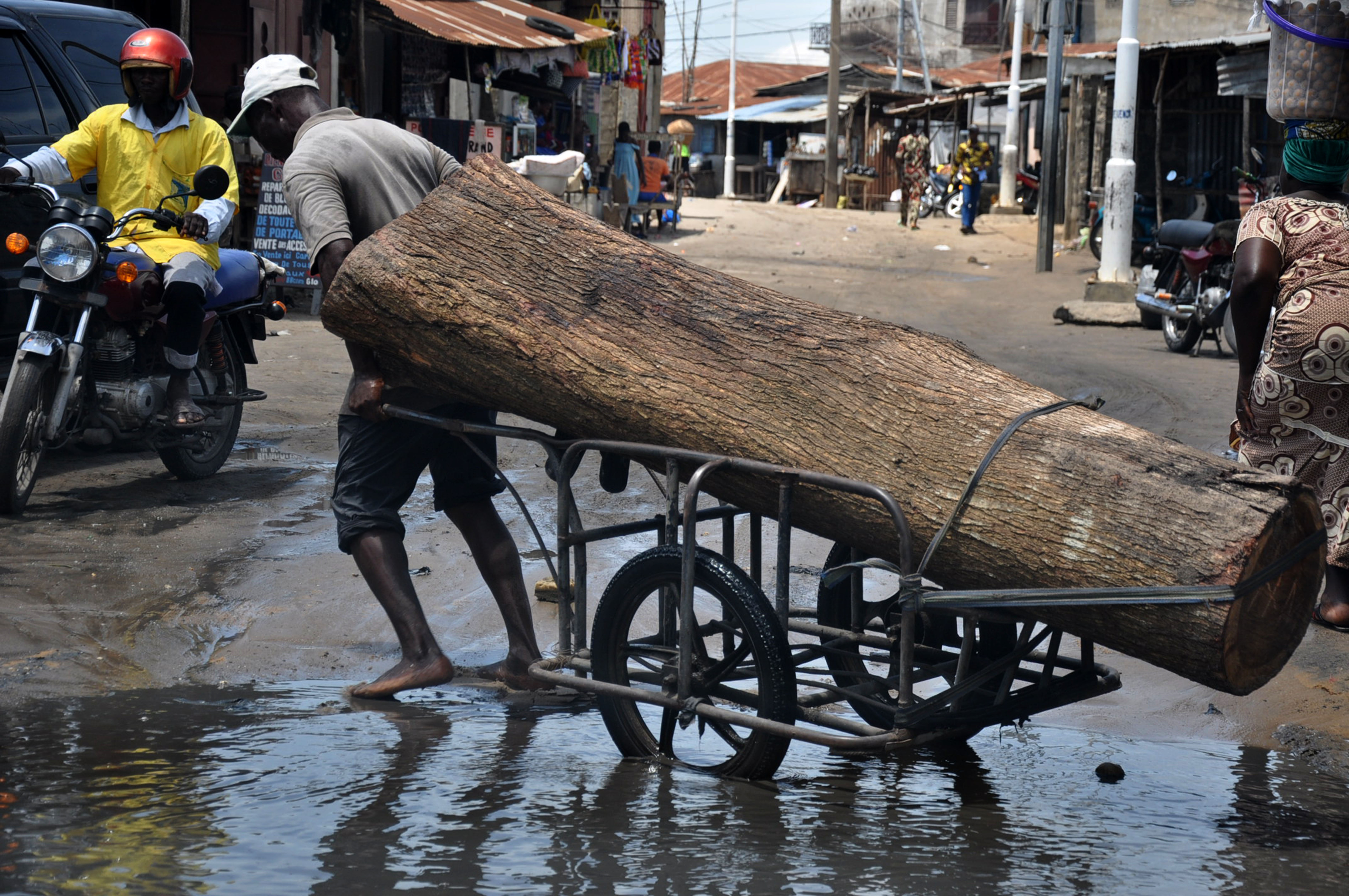 against wind, sun rain, this man does not give up to provide for his family This is an image with the theme "Africa on the Move or Transport" from: Benin